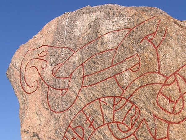 Sö109 detalj upp